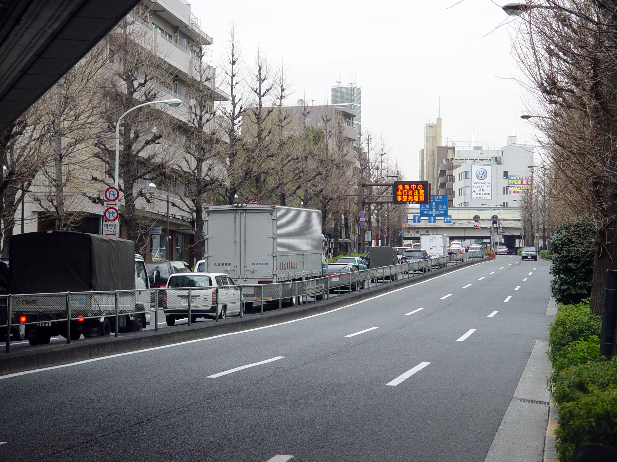 Kakinokizaka slope, Meguro, Tokyo, Japan柿の木坂